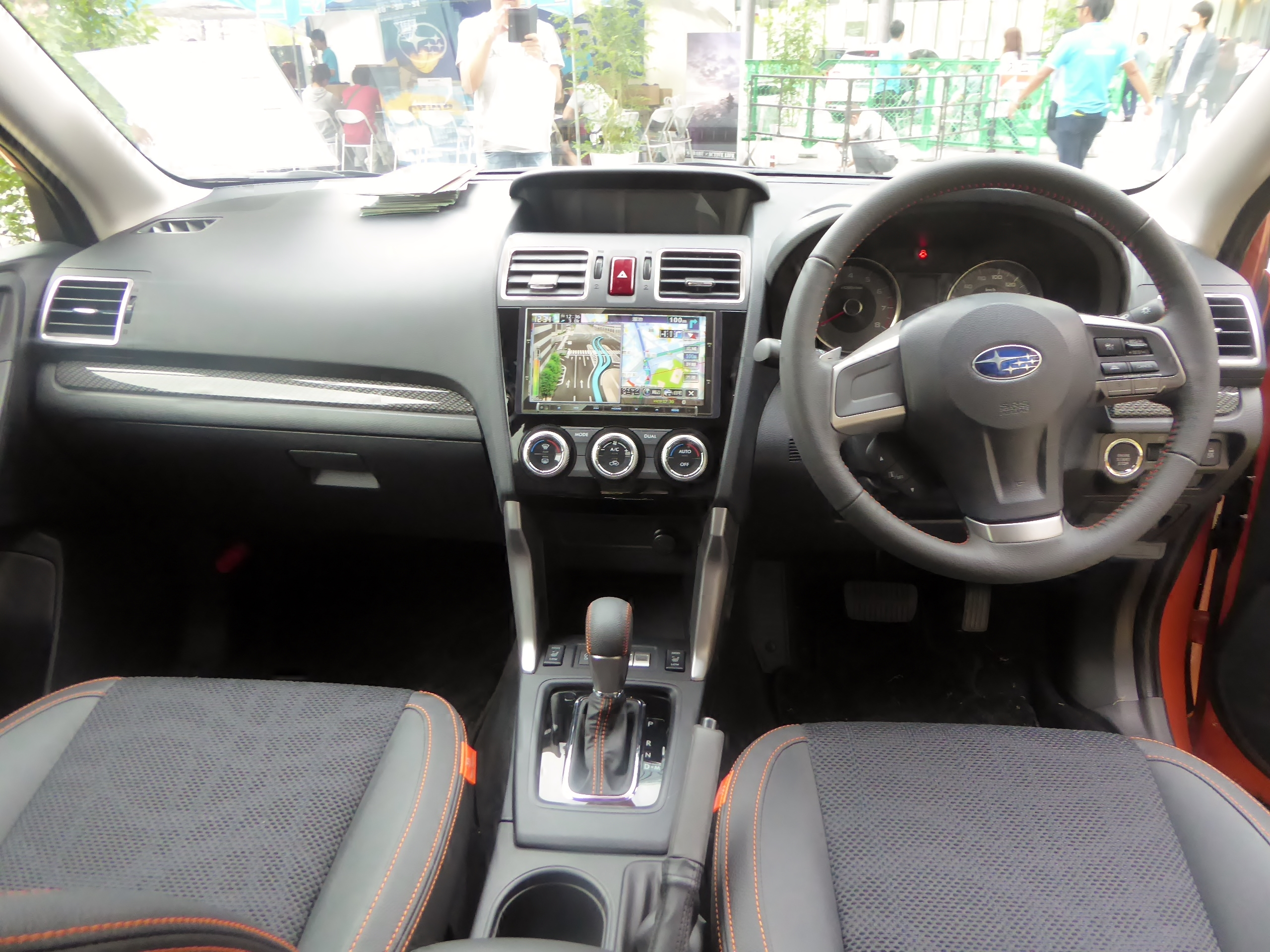 SJ型スバル・フォレスターX-BREAKのインテリアを撮影。